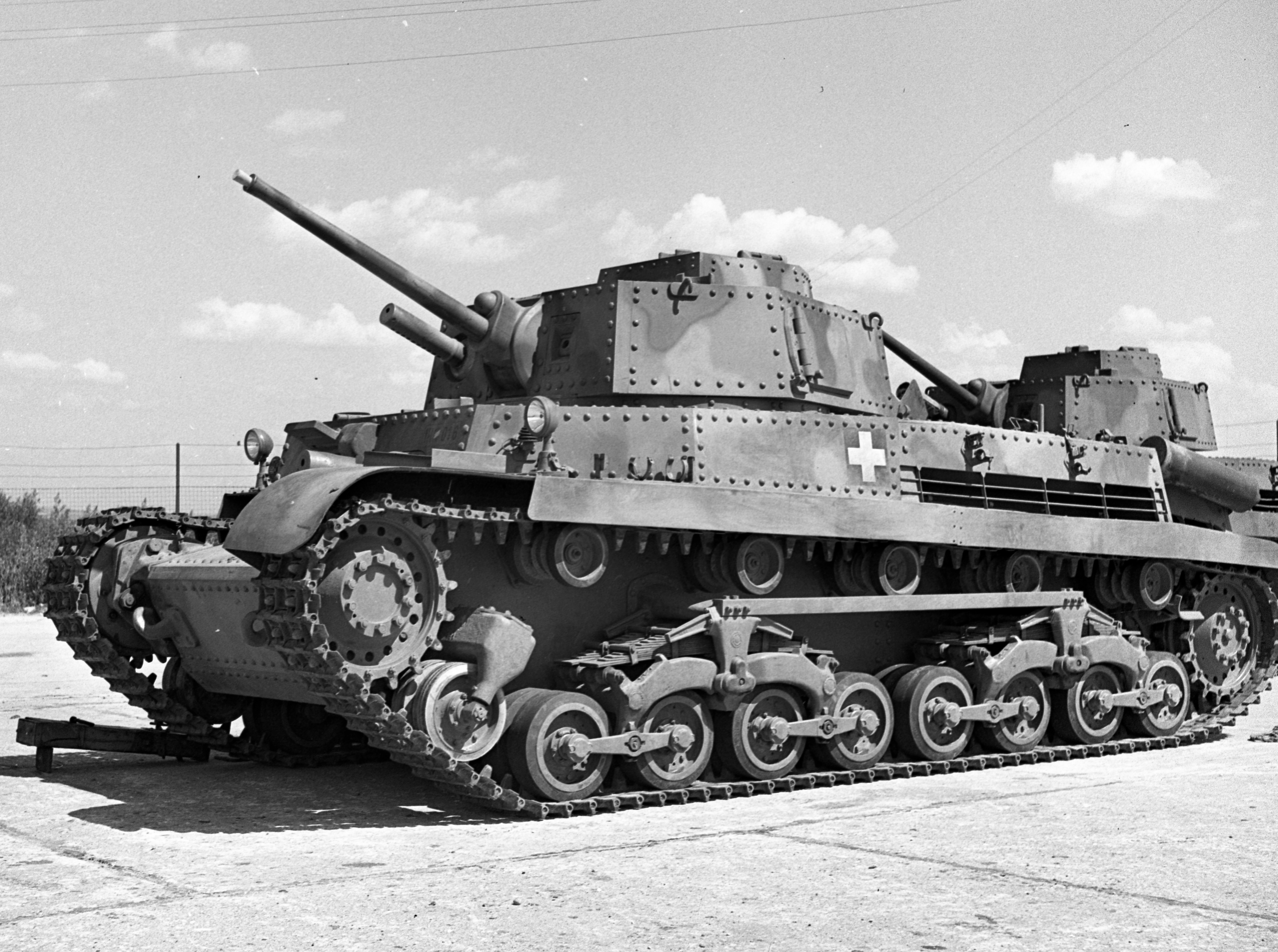 Mátyásföld, Újszász utca 41-43. Magyar Királyi Honvéd gépkocsiszertár udvara, Turán típusú harckocsik. Location: Hungary, Budapest XVI.